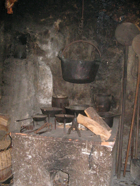 Lizenjakova domačija, Kranjska gora, Slovenija, bohkov kotek